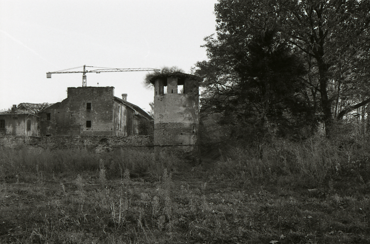 Servizio fotografico : Legnano, 1980 / Paolo Monti. - Strisce: 3, Fotogrammi complessivi: 16 : Negativo b/n, gelatina bromuro d'argento/ pellicola ; 35 mm. - ((Sul portanegativi: N[I]K[MA]T FP4 e iscrizione: "Castello di Legnano 22-37". - Confronta scheda 3558Lpbn22-37. - Occasione: Documentazione per la pubblicazione: Vincenti Antonello, "Castelli viscontei e sforzeschi", Milano, Rusconi immagini, 1981. - Fonte: Agenda di Paolo Monti: Nikon Leika 3001-/ Monti 1978 (1978-1982), presso Archivio Paolo Monti. - Fonte: Monografia di Vincenti, Antonello: Castelli viscontei e sforzeschi, Milano, Rusconi immagini (1981)